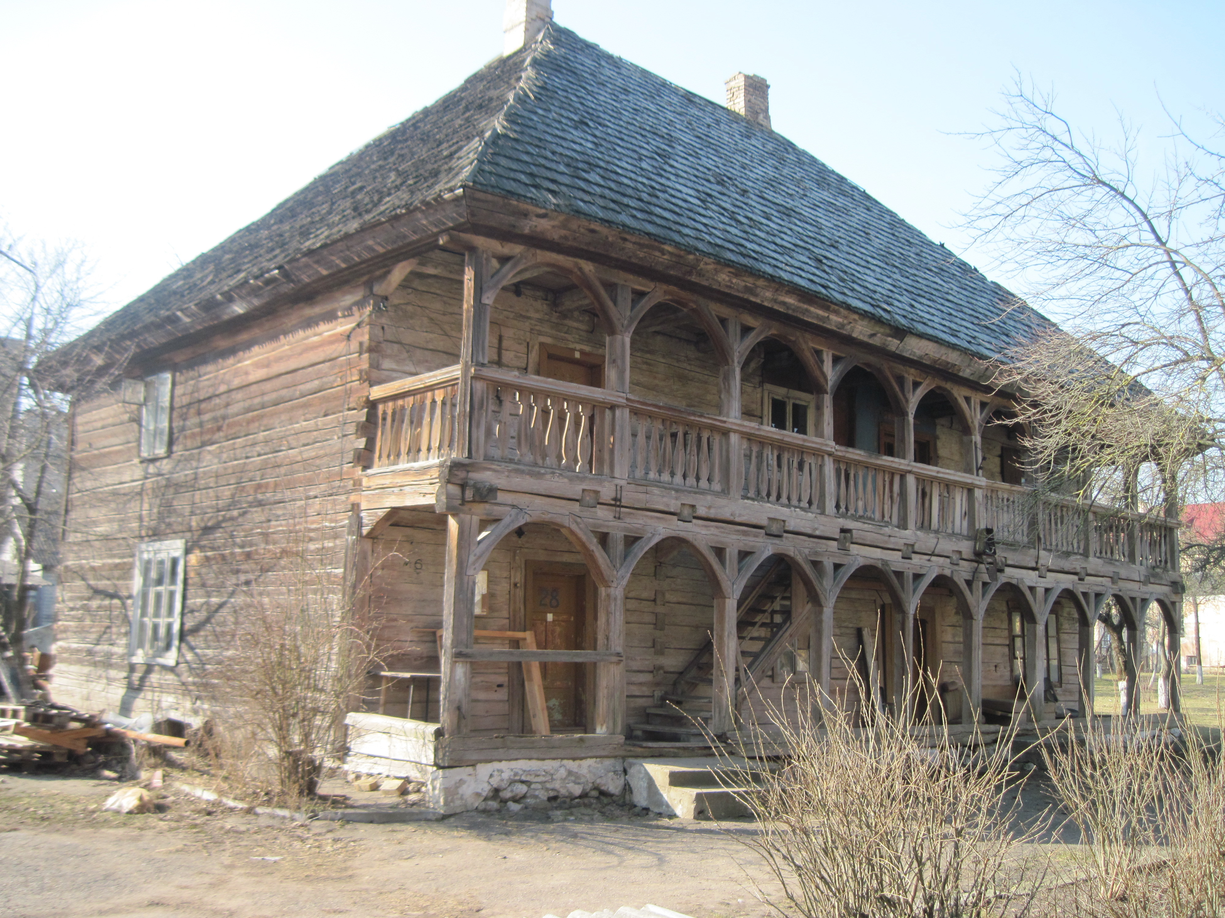 Драўляны лямус у Гродне